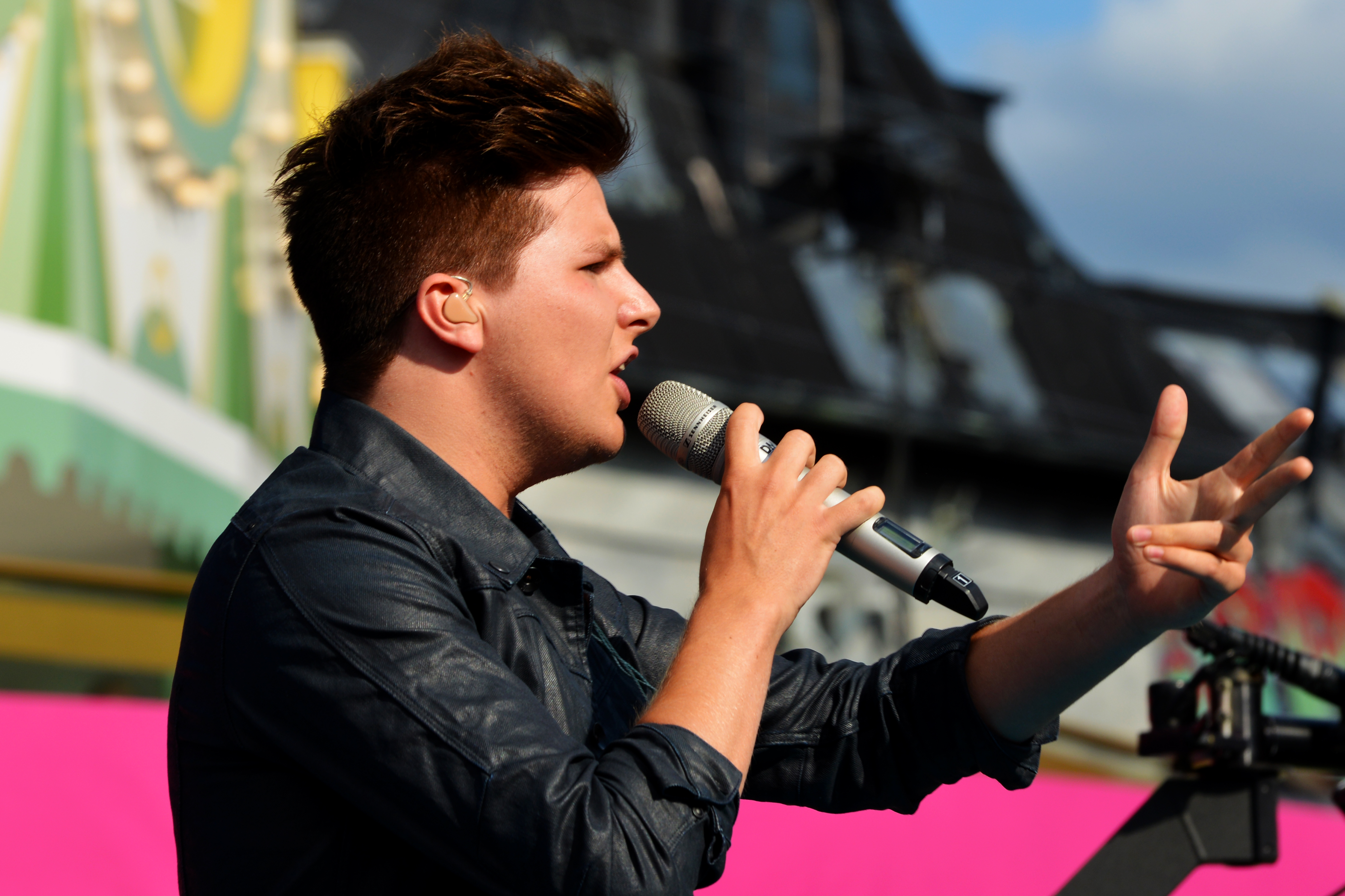 Robin Stjernberg uppträder på Sommarkrysset i Stockholm inne på Gröna Lund.